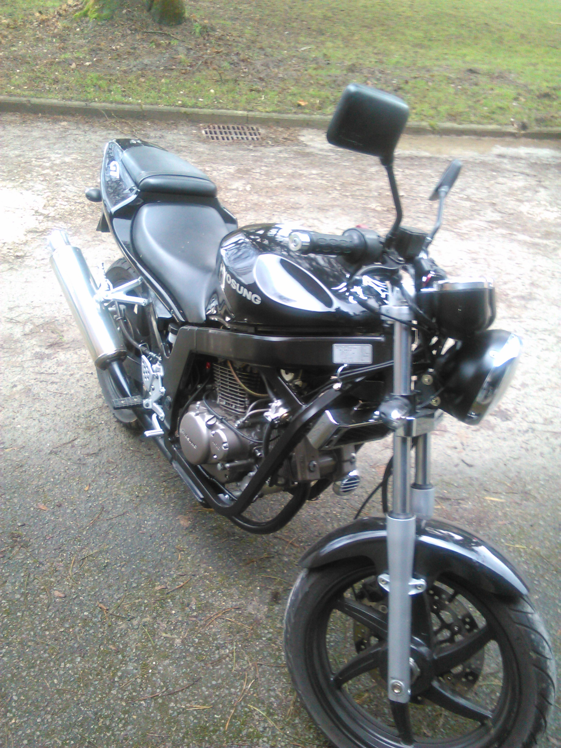 Photo d'une 125 Hyosung.